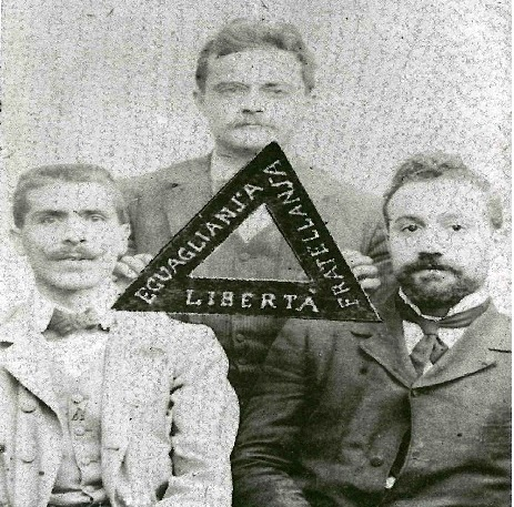 Vincenzo de Angelis, al centro della foto, insieme con due "fratelli" massoni, forse della loggia "Rocco Verduci" fondata a Brancaleone nel 1911